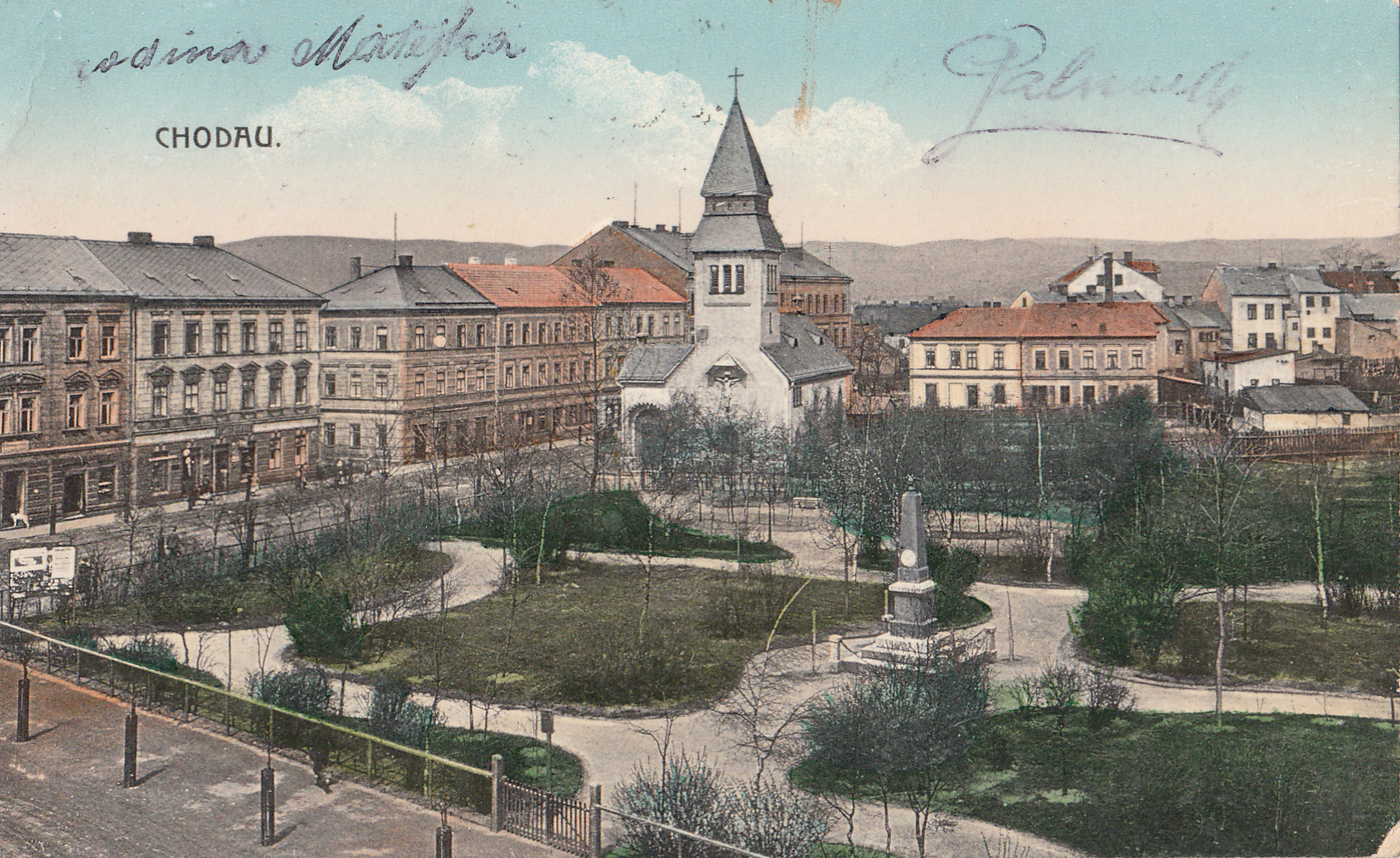 Městský park v Chodově kolem roku 1910. Vidět je tehdejší Fenklova ulice, dnešní ulice Dukelských hrdinů, a chodovský evangelický kostel z roku 1906. V parku stojí pomník obětem válek z roku 1898.